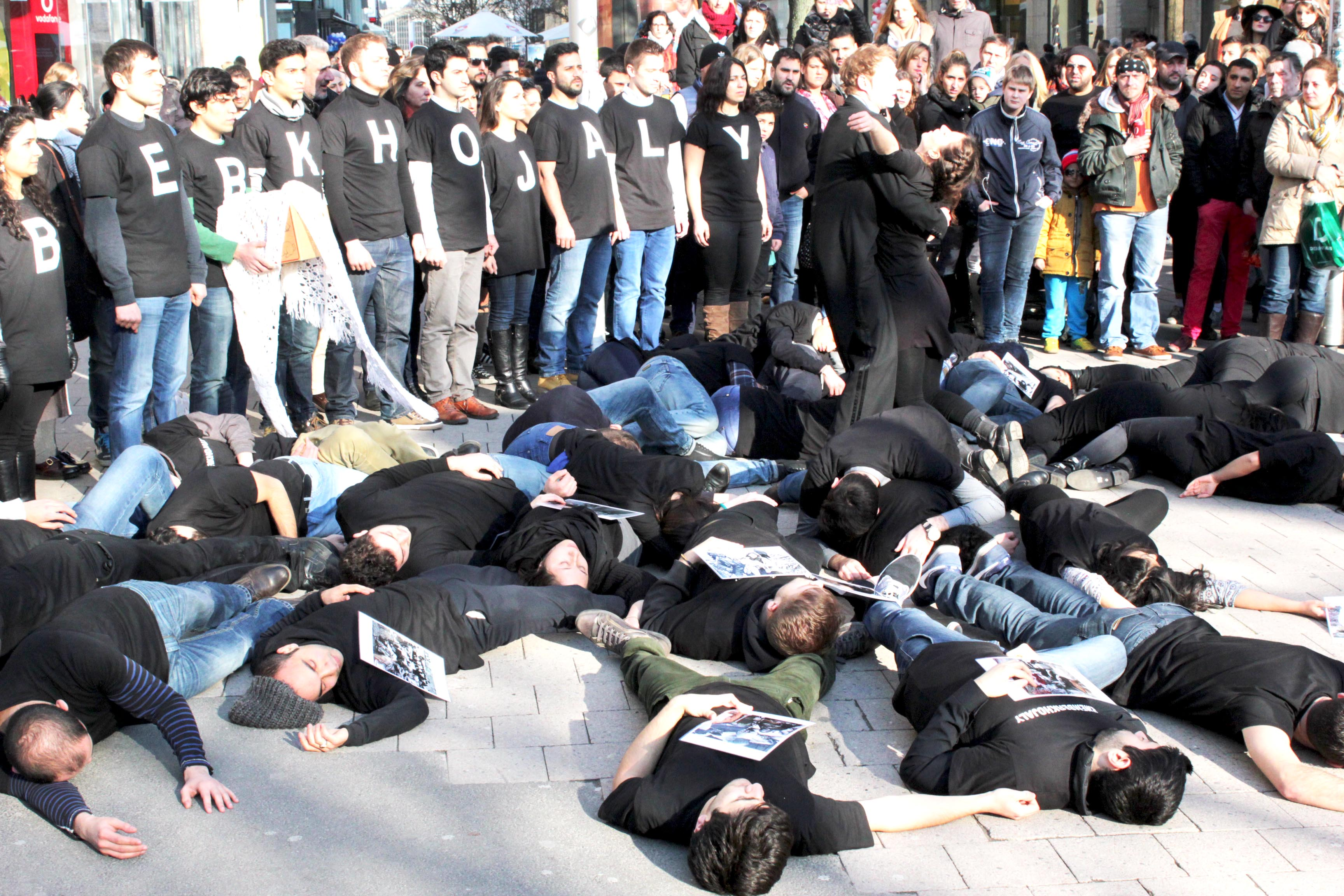 Am 28. Februar 2015 fand in Hamburg ein Flashmob anlässlich der Tragödie von Chodschali statt. Unter dem Motto #RememberKhojaly wurde in der Hamburger Innenstadt an der Gabelung der Spitalerstraße / Lilienstraße ein pantomimisches Tanztheater vorgeführt. Die Veranstaltung wurde von Azerbaijan Student Network organisiert.